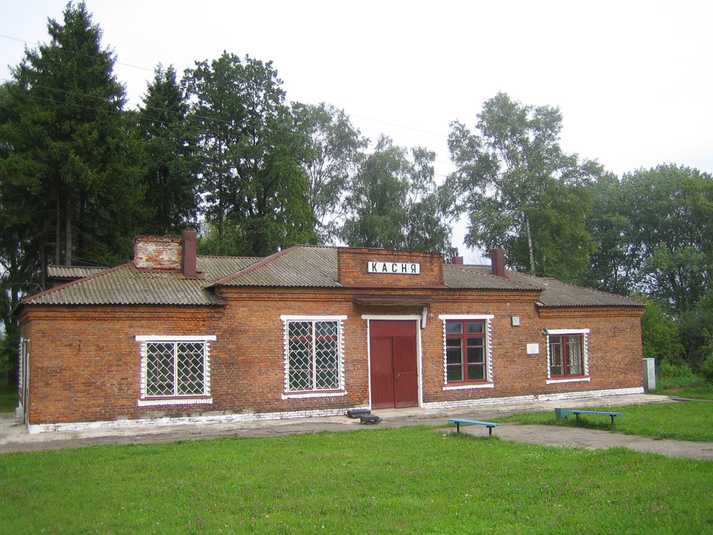 Вокзал на станции Касня